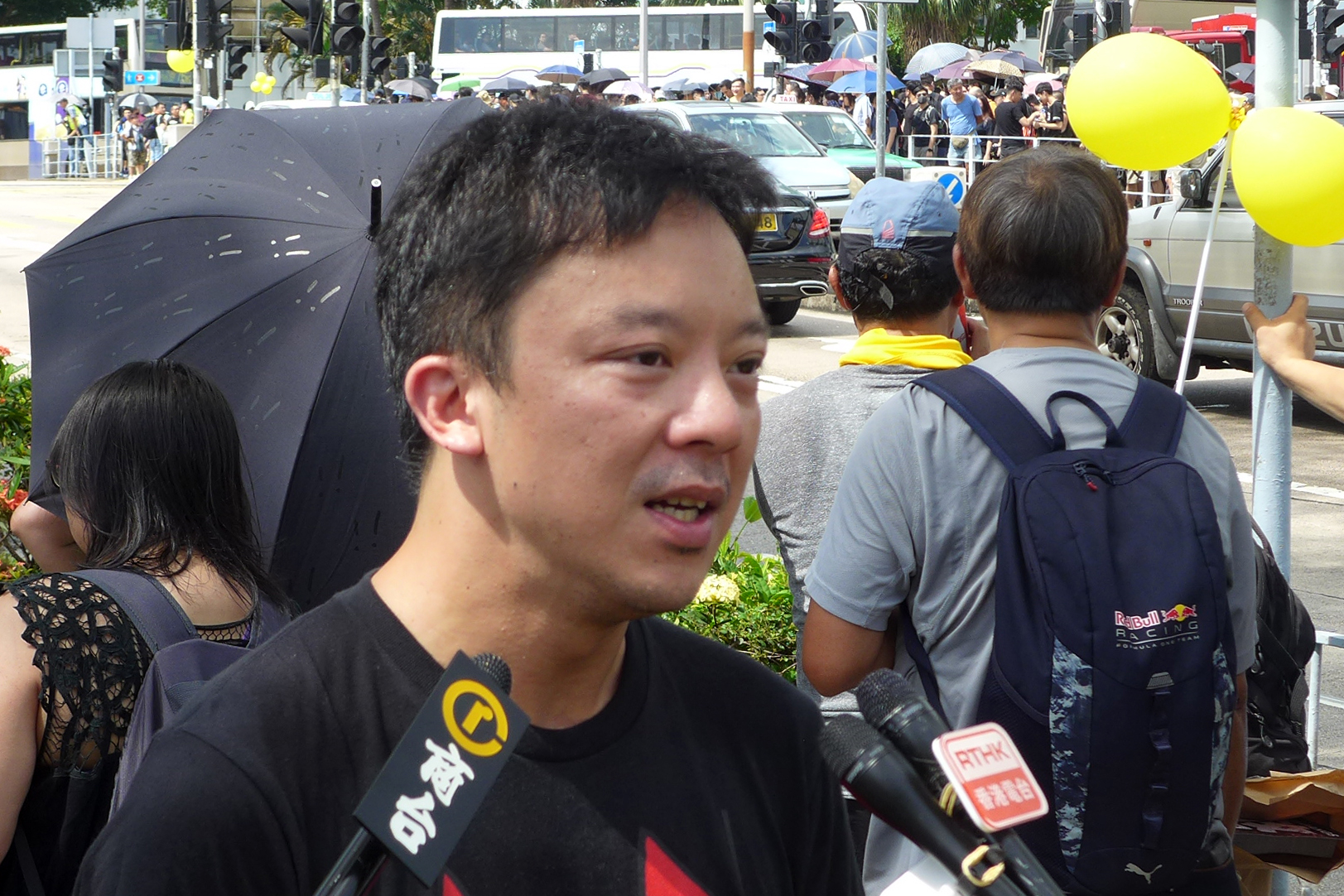 Max Chung in Yuen Long